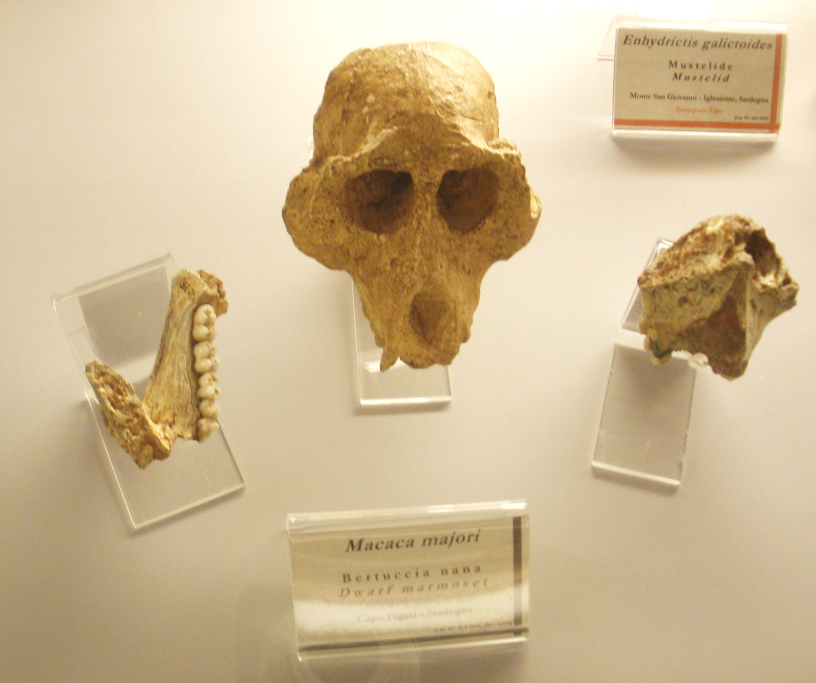 Fossil of Macaca, an extinct mammal- Took the picture at Museo di Paleontologia di Firenze